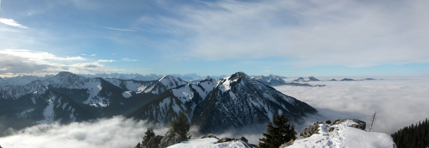 Blick auf die Bayerischen Alpen